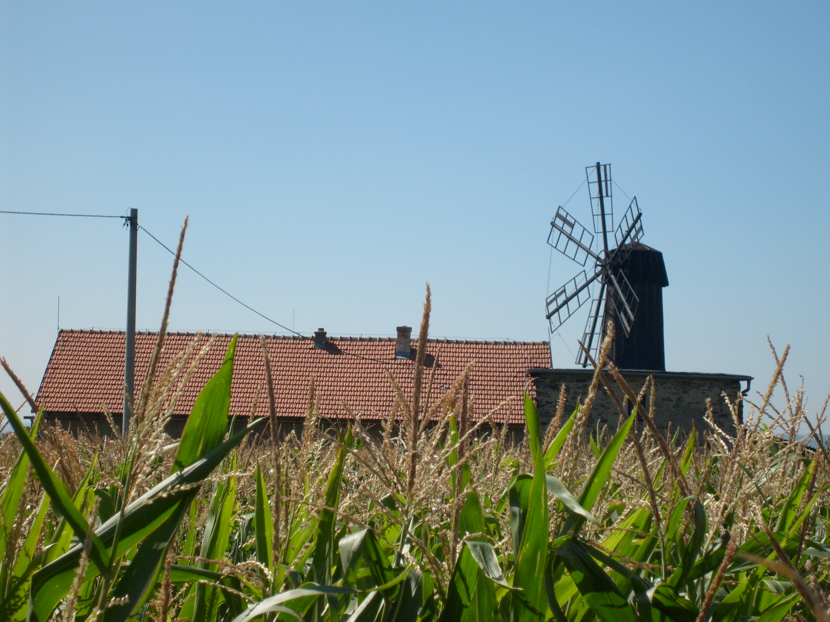 Větrný mlýn, Hačky, Olomouc Region, Czech Republic